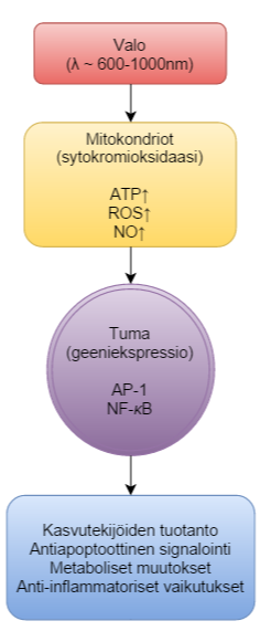 Pienteholaserhoidon vaikutusten uskotaan johtuvan sen vaikutuksista mitokondrion sytokromioksidaasi-entsyymiin. ATP:n, ja reaktiivisten happoyhdisteiden lisääntynyt tuotanto, sekä typpioksidin vapautuminen, voivat johtaa lukuisiin muutoksiin geenien ilmentymisessä ja solujen toiminnassa.